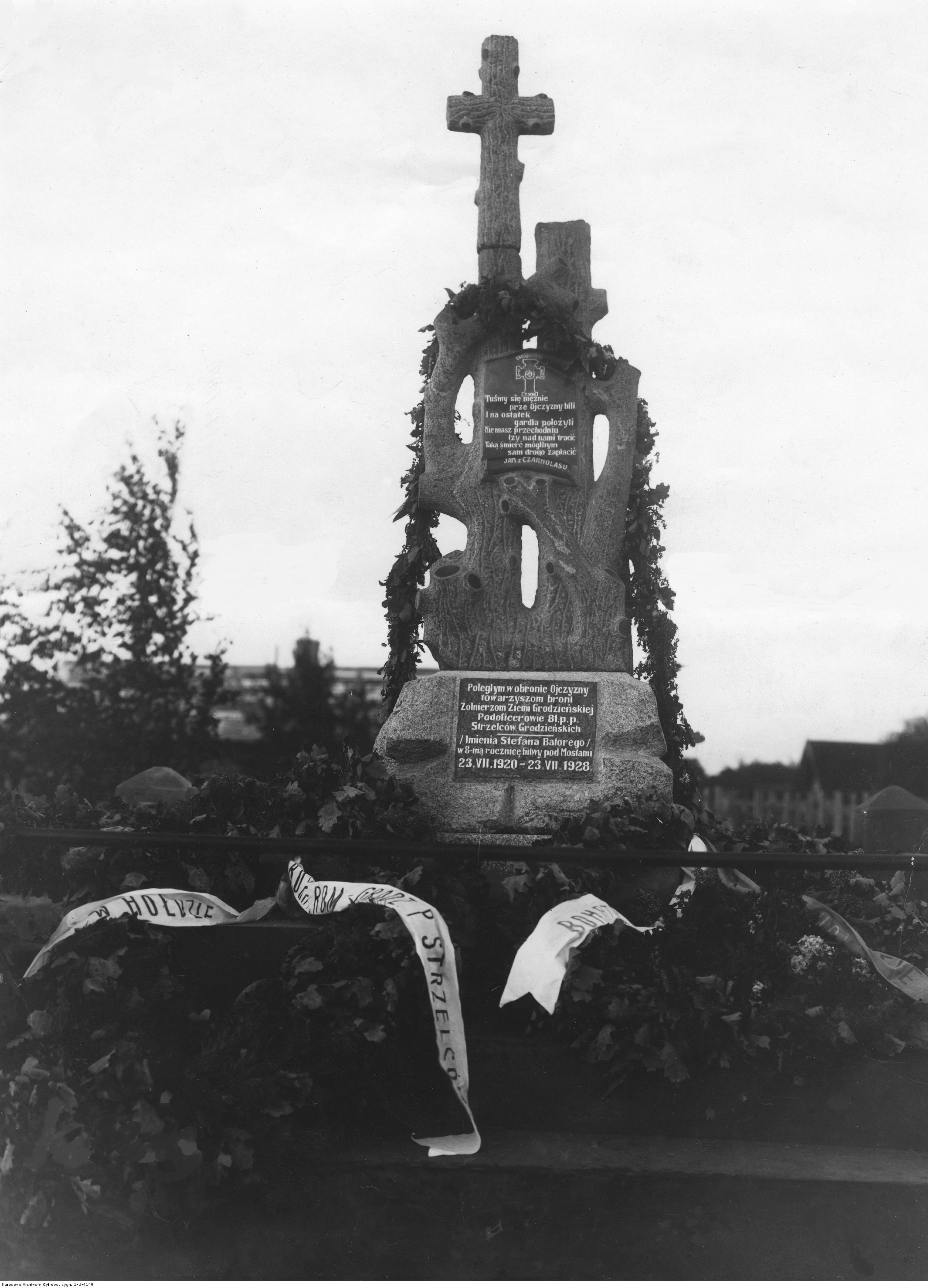 Pomnik ku czci poległych w 1920 r. żołnierzy Grodzieńskiego Pułku Strzelców w Mostach. Widok na pomnik ufundowany przez podoficerów 81. pułku piechoty. Pod pomnikiem wieńce.